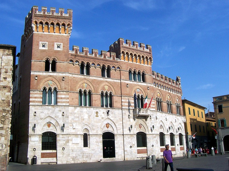 Grosseto - Palazzo Aldobrandeschi